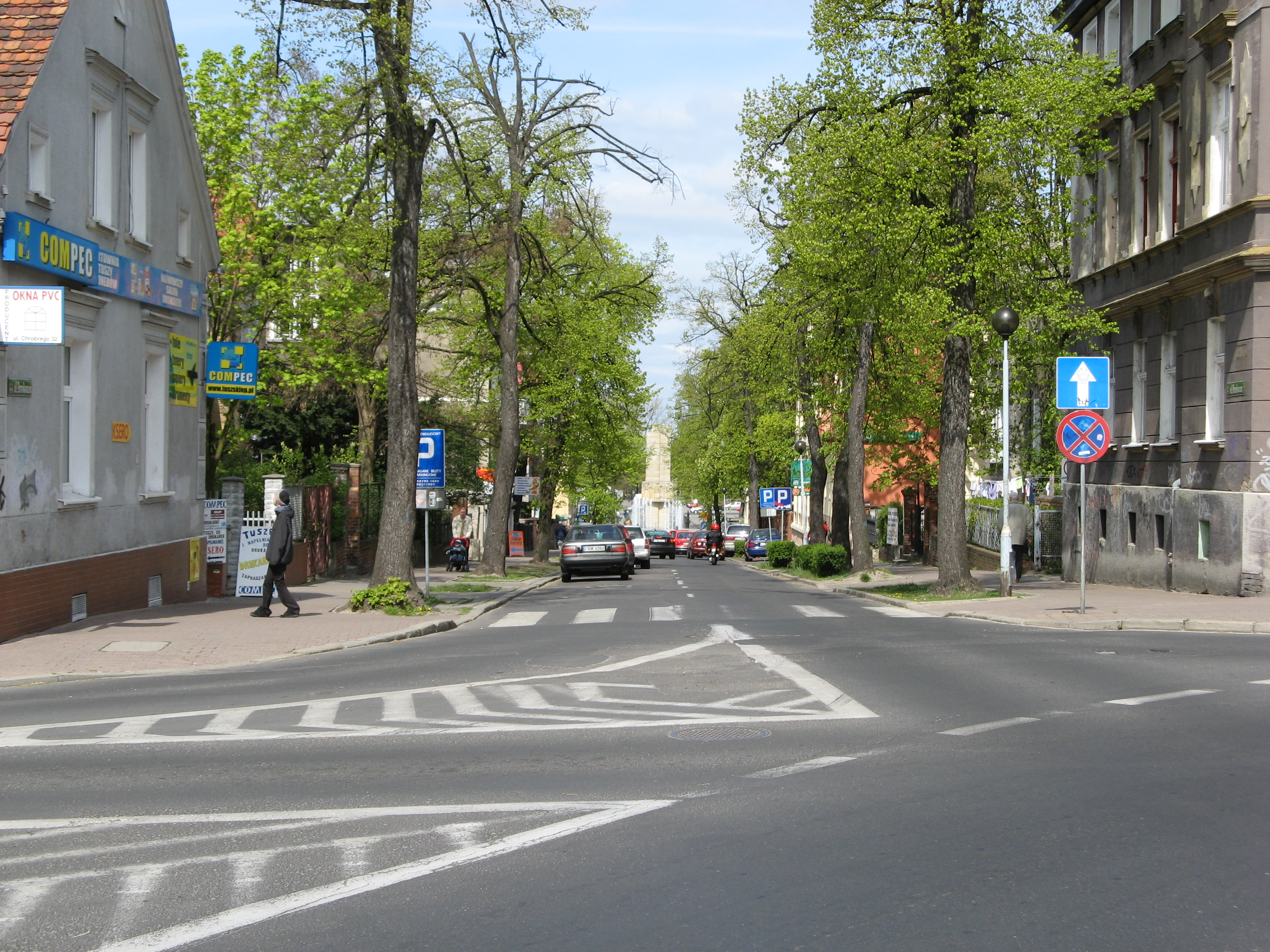 Zielona Góra - ulica Bankowa